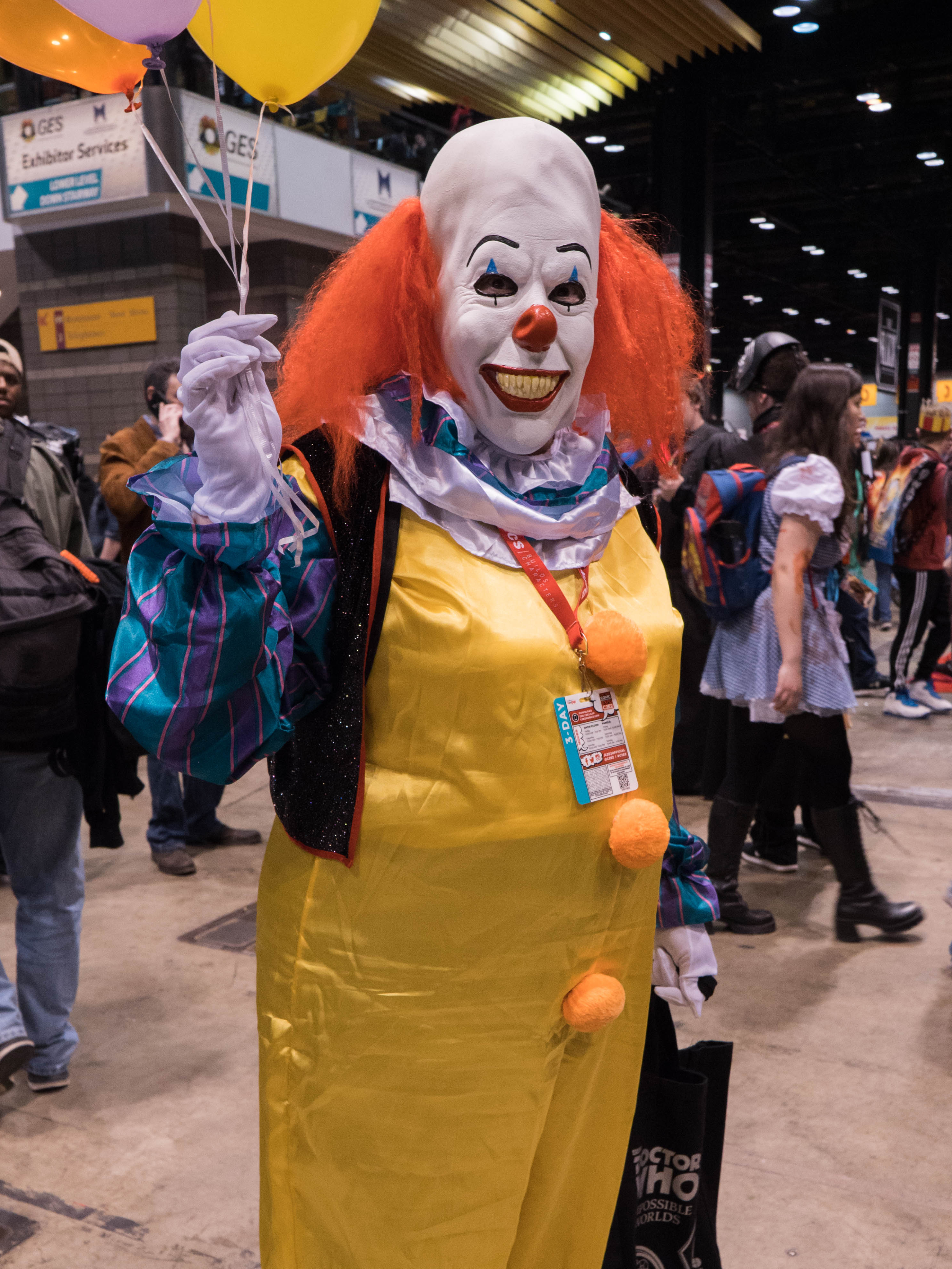 Cosplay del payaso asesino Pennywise (versión 1990) en la Chicago Comic & Entertainment Expo 2017.